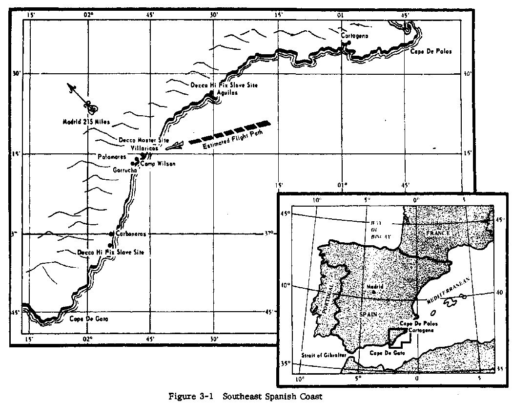 Nuklearunglück von Palomares: Reconstruierte Flugroute